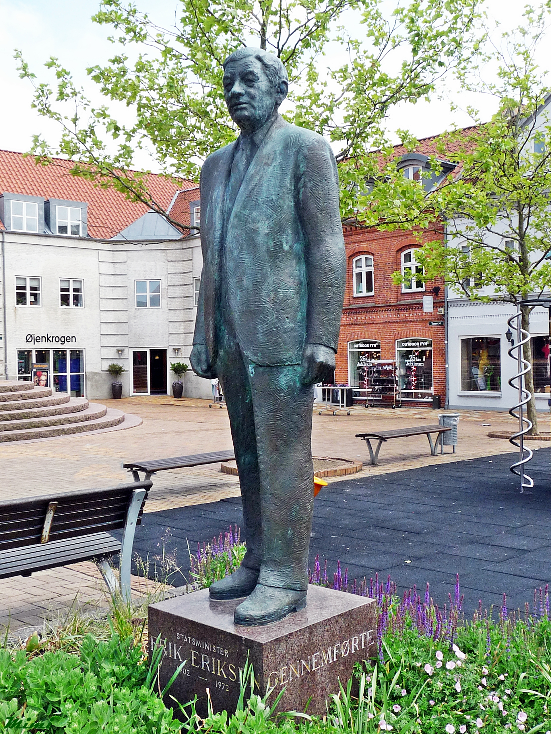 Statue af Statsminister Erik Eriksen, på Torvet i 5750 Ringe, DK Kunstner: Udført af Robert Lund-Jensen (1915-2003) Malersvend, Elev hos Erik Cohrt, Odense, 1935-36, gik på Teknisk Skole på Frederiksberg 1942-43. Mål: H: 245 cm Br: 157 cm Dybde: 57 cm Beskrivelse: Statuen er udført i Bronze. Den står på en Granitsokkel i et Kvadratisk Blomsterbed. Den blev opsat i 1978 med støtte fra forskellige Fonde og forestiller tidligere Statsminister Erik Eriksen (1902-72). Han var Statsminister 1950-53 og stod fadder til Grundlovsændringen 5. juni 1953. Afsløringen af Statuen var bl.a. med Tale af Folketingets Formand Karl Skytte og Musik med Slesvigske Fodregiments Musikkorps. Inskriptionen på Soklens fire sider lyder: Statsminister Erik Eriksen 1902-1972/Gennemførte/Grundlovens/Ændring 1953. Statuen blev flyttet til sin nuværende plads i 1994.